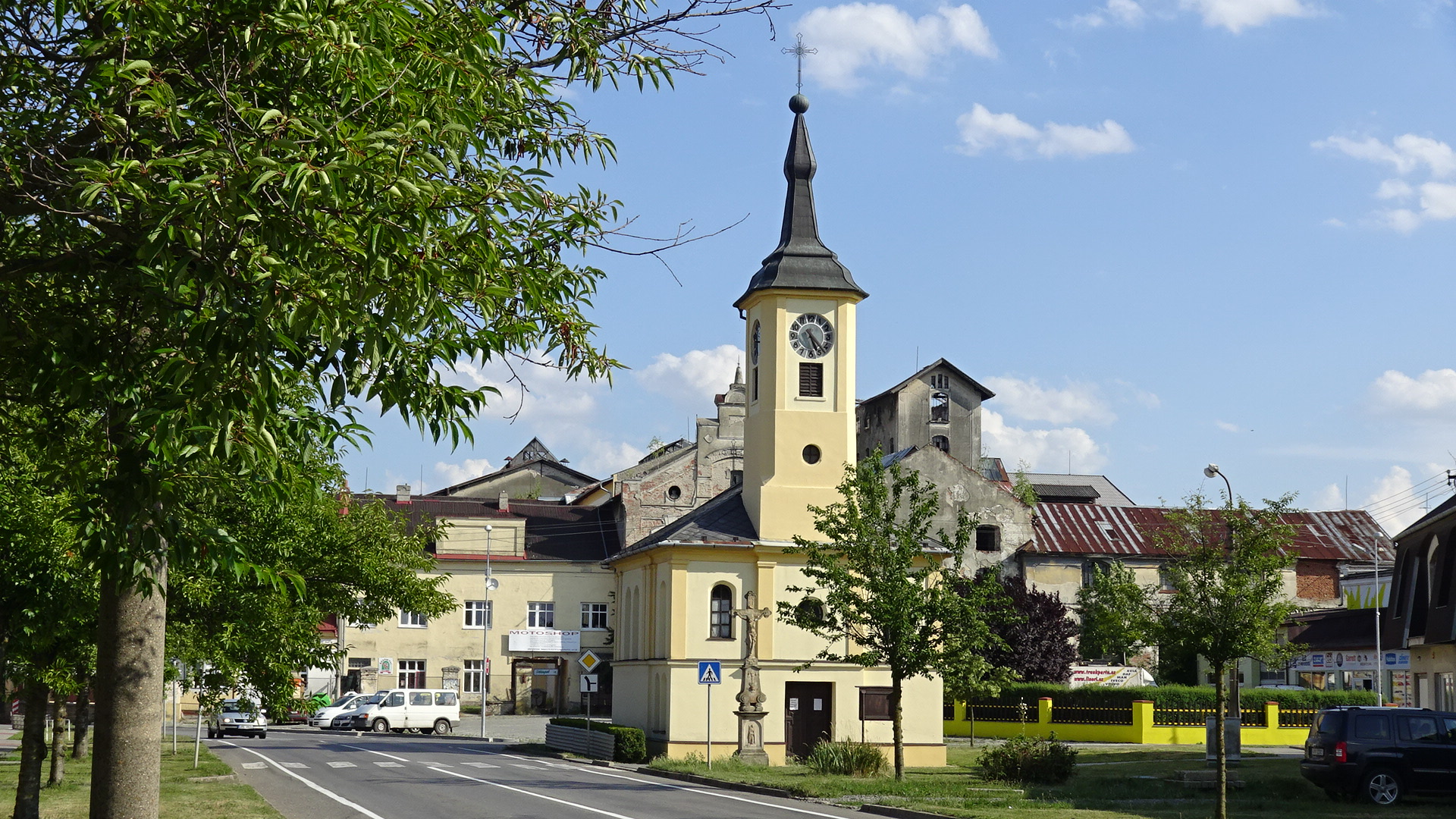 Kaple sv. Floriána v obci Bedihošť